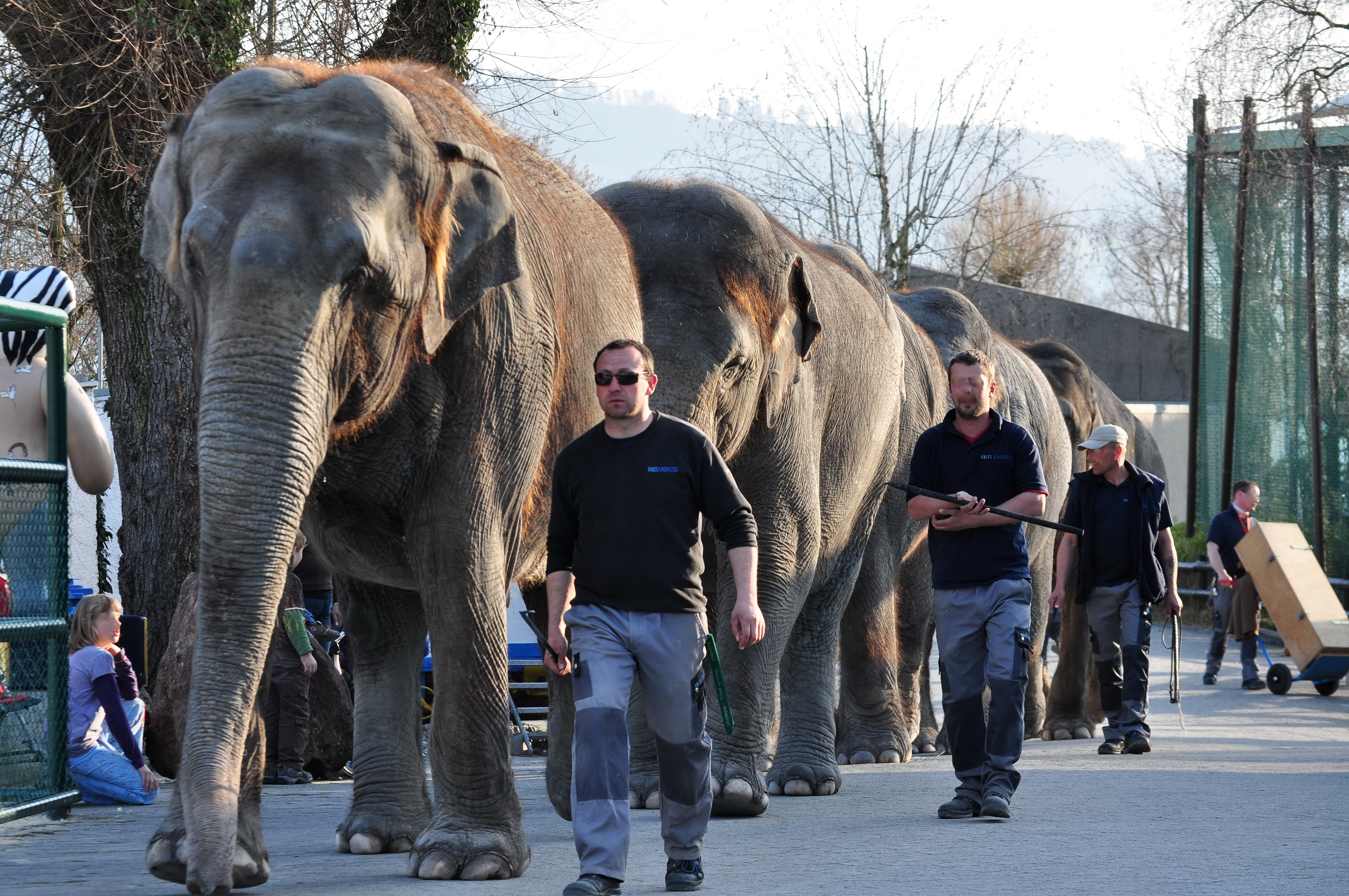 Elephas maximus, Knie's Kinderzoo in Rapperswil (Switzerland)